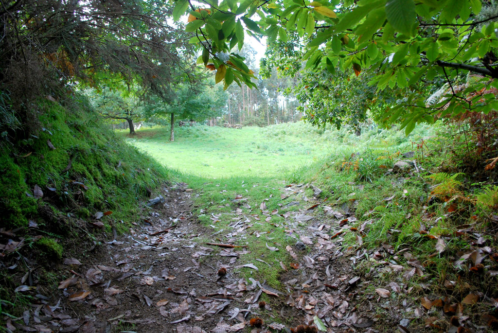 Acceso ao castro de Eiravedra en Sedes, Narón A Coruña Galiza Spain